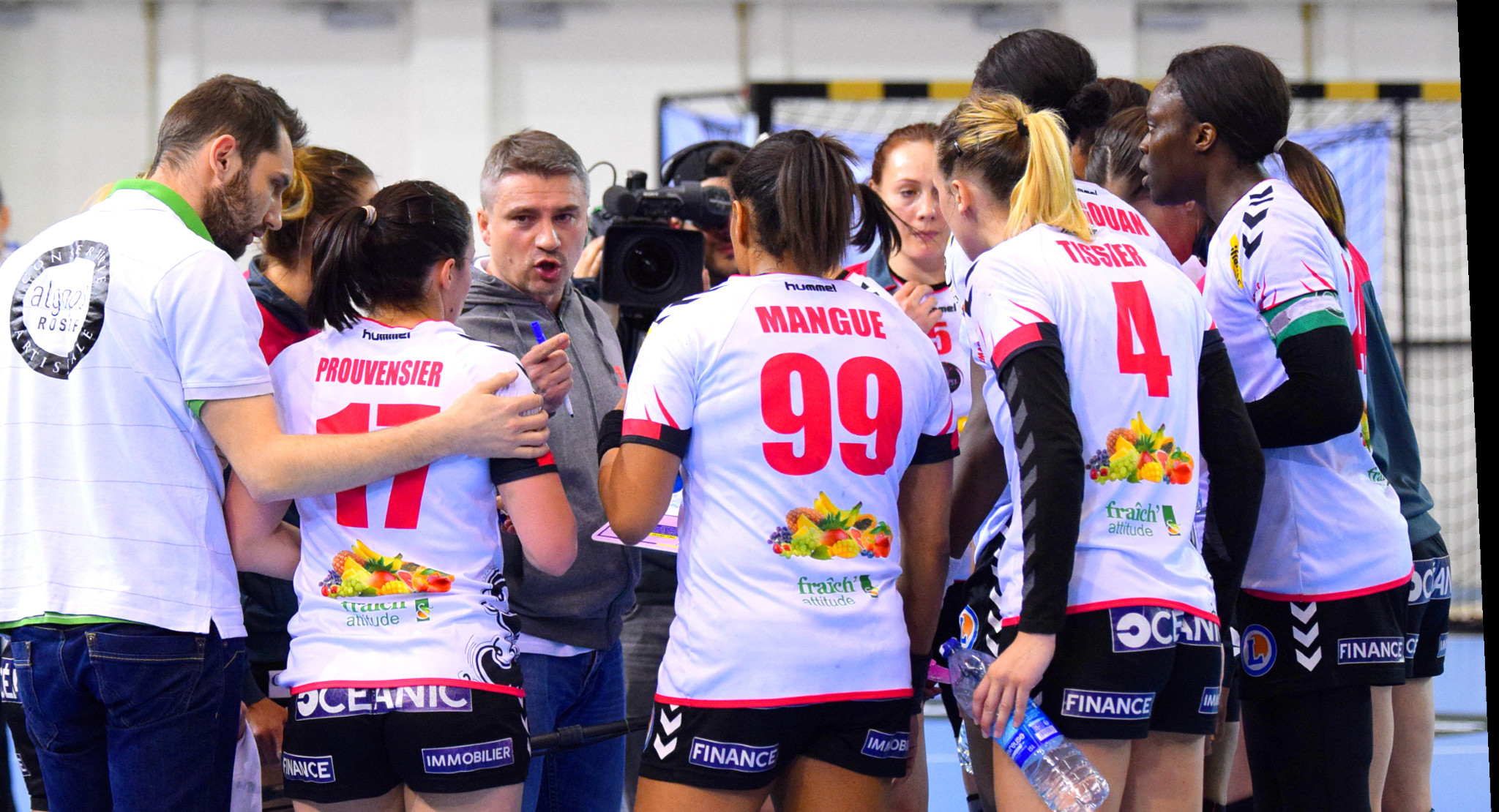 Rencontre de demie-finale de coupe de France entre Issy Paris et Brest. A Issy les Moulineaux, le 26 avril 2017.